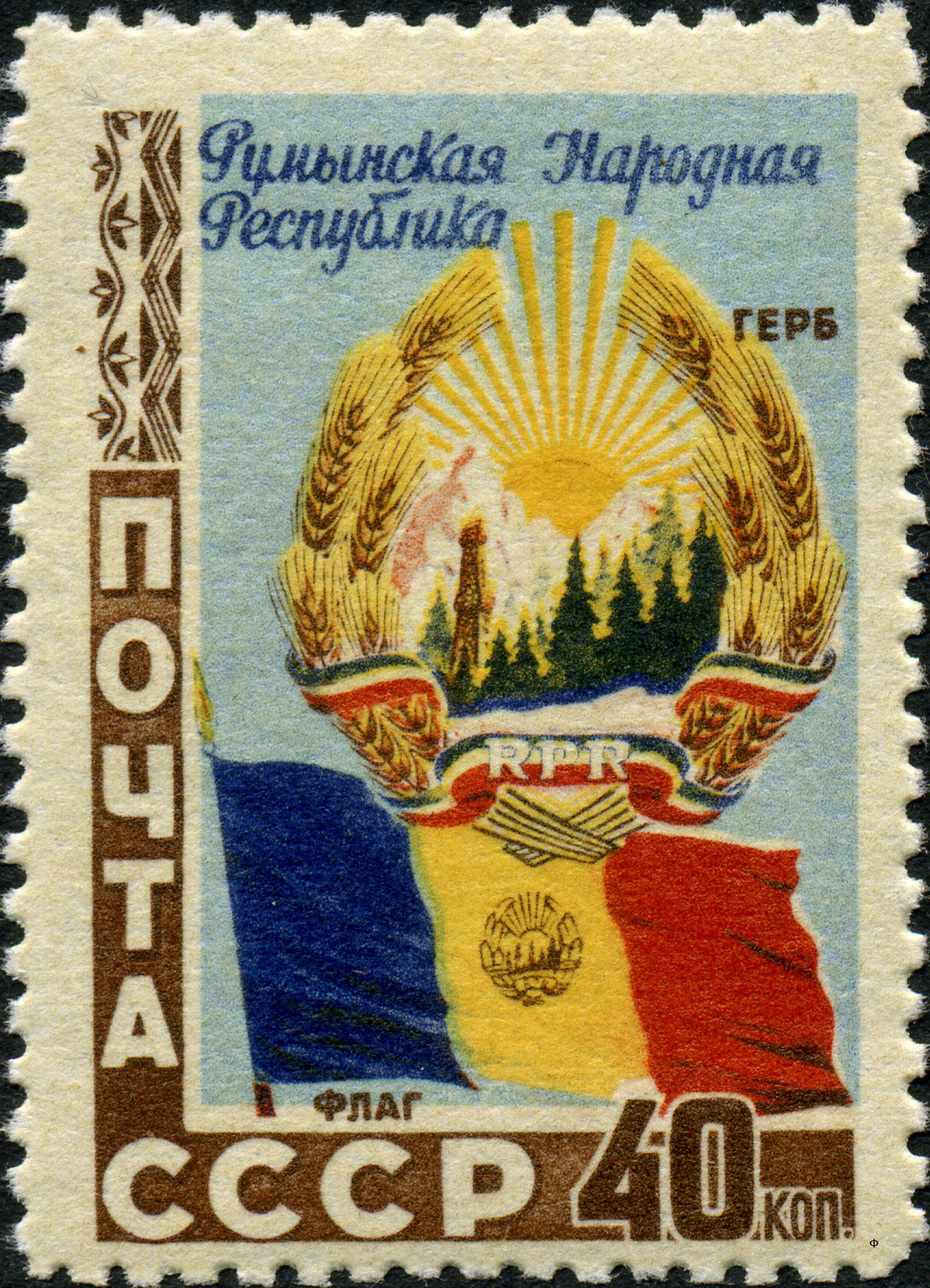 Почтовая марка СССР, выпущенная в июле 1952 года и посвящённая Румынской Народной Республике, провозглашённой 30 декабря 1947 года. На марке изображены государственный герб и флаг республики. Художник — В. Андреев. Номер по каталогу ЦФА — 1687. Тираж — 1 млн экз.